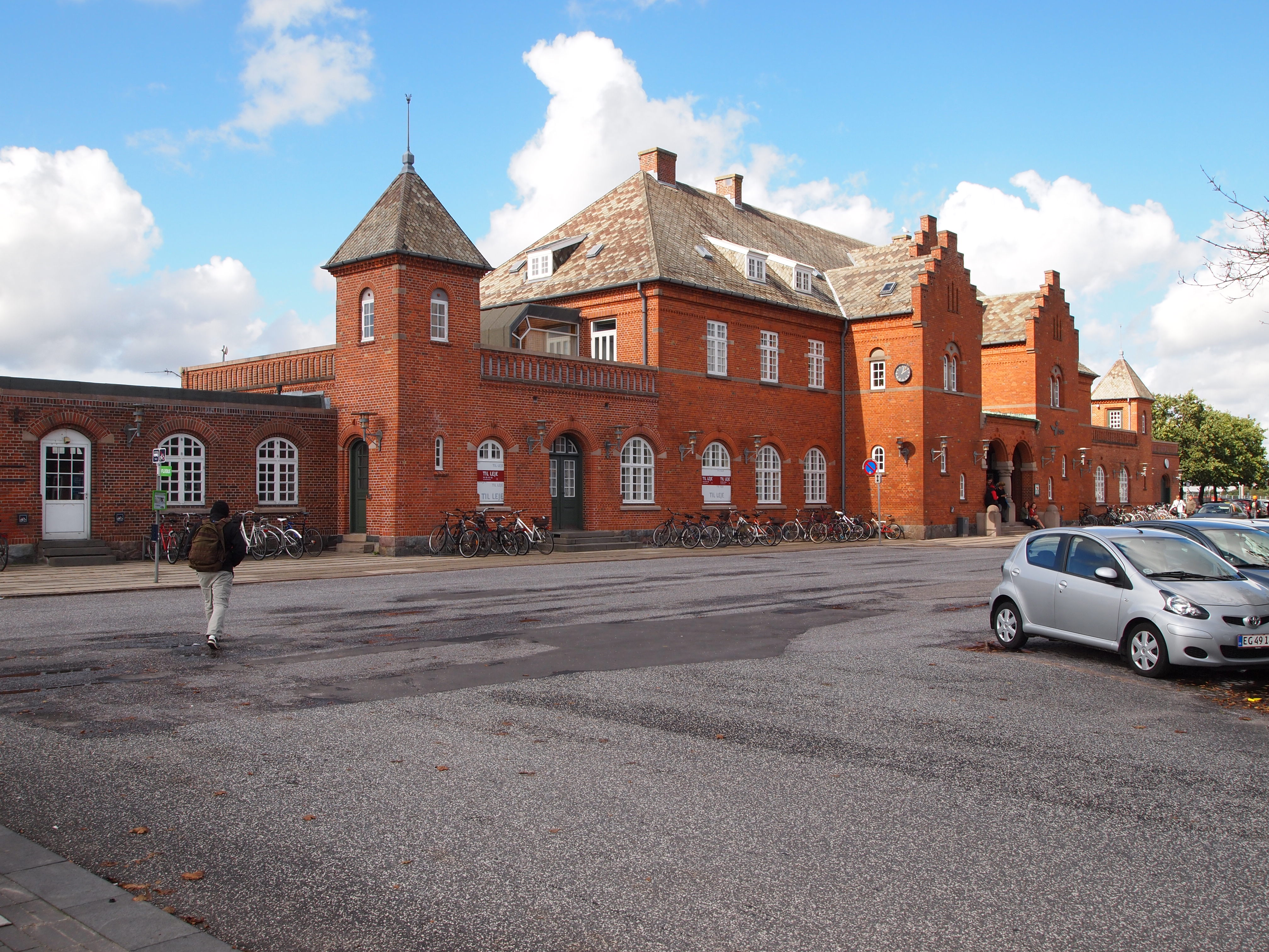 Holstebro Station